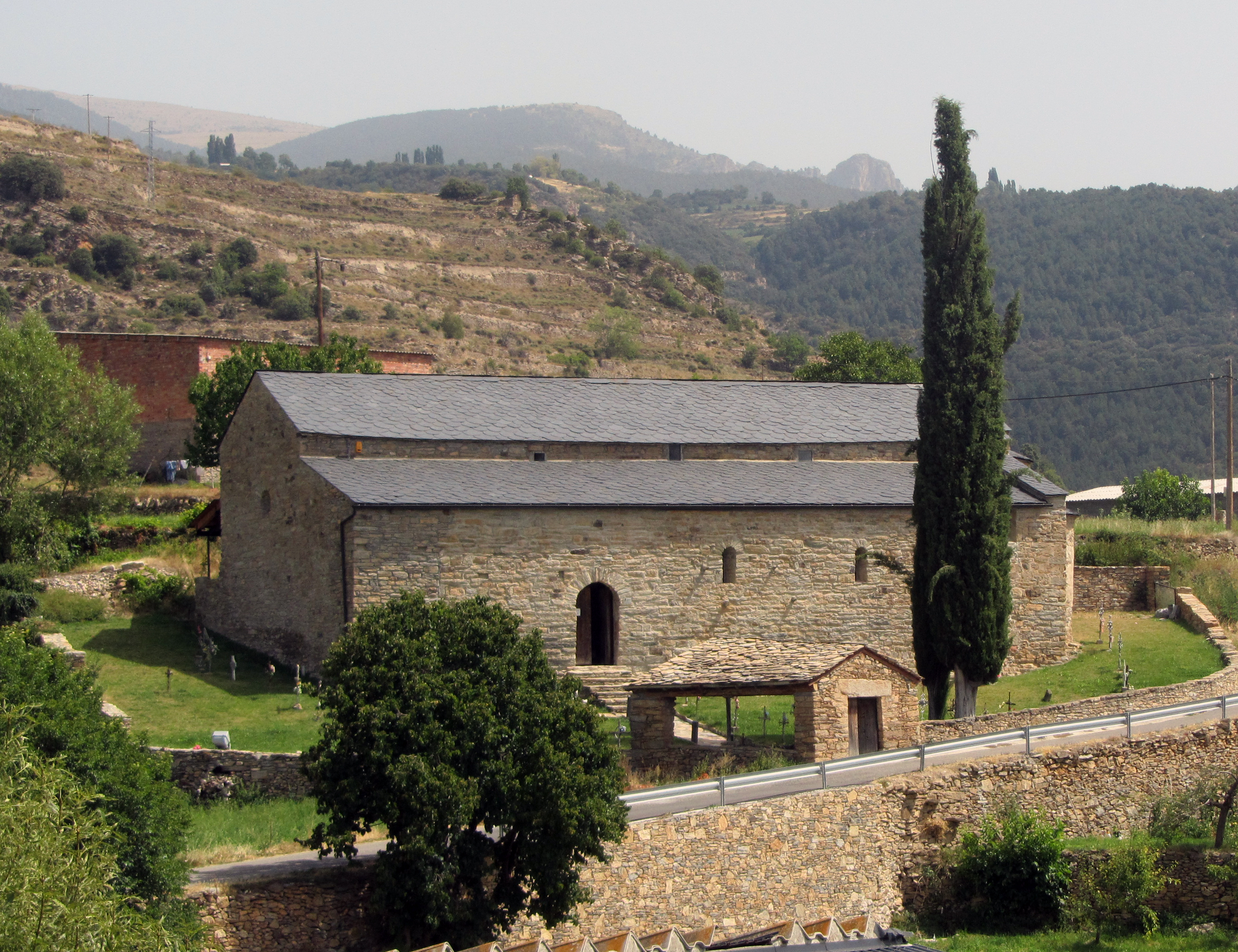 Iglesia de Sant Vicenç de Estamariu. Alto Urgel Cataluña Spain